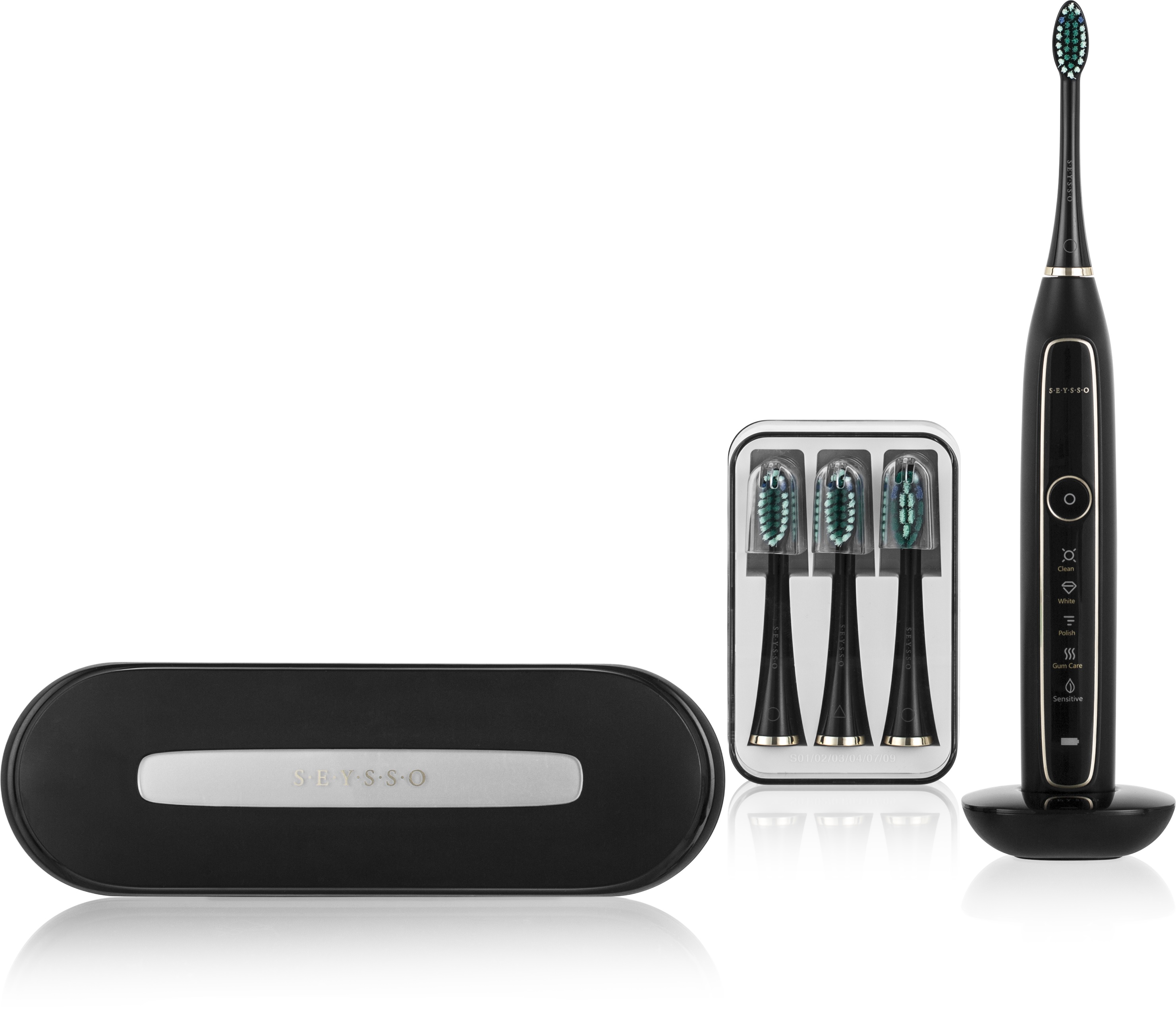 Szczoteczka soniczna z dodatkami: etui w formie ładowarki oraz końcówki w pojemniku ochronnym